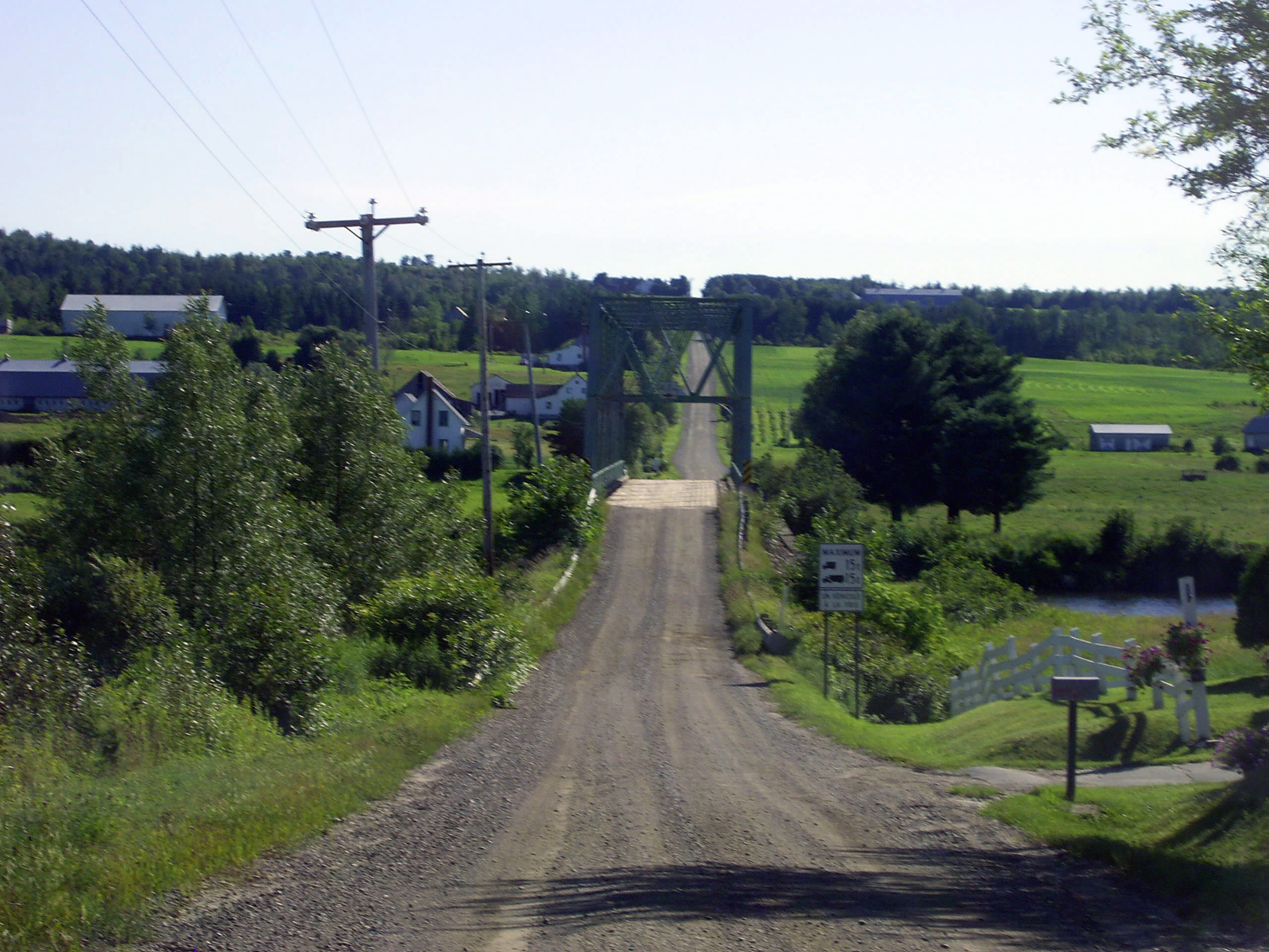 Pont de Fontainebleau, Qc Photo prise par Bib